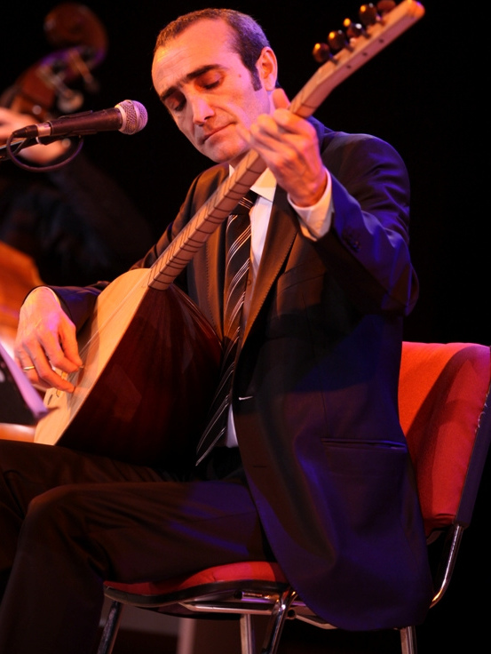 Cengiz Özkan